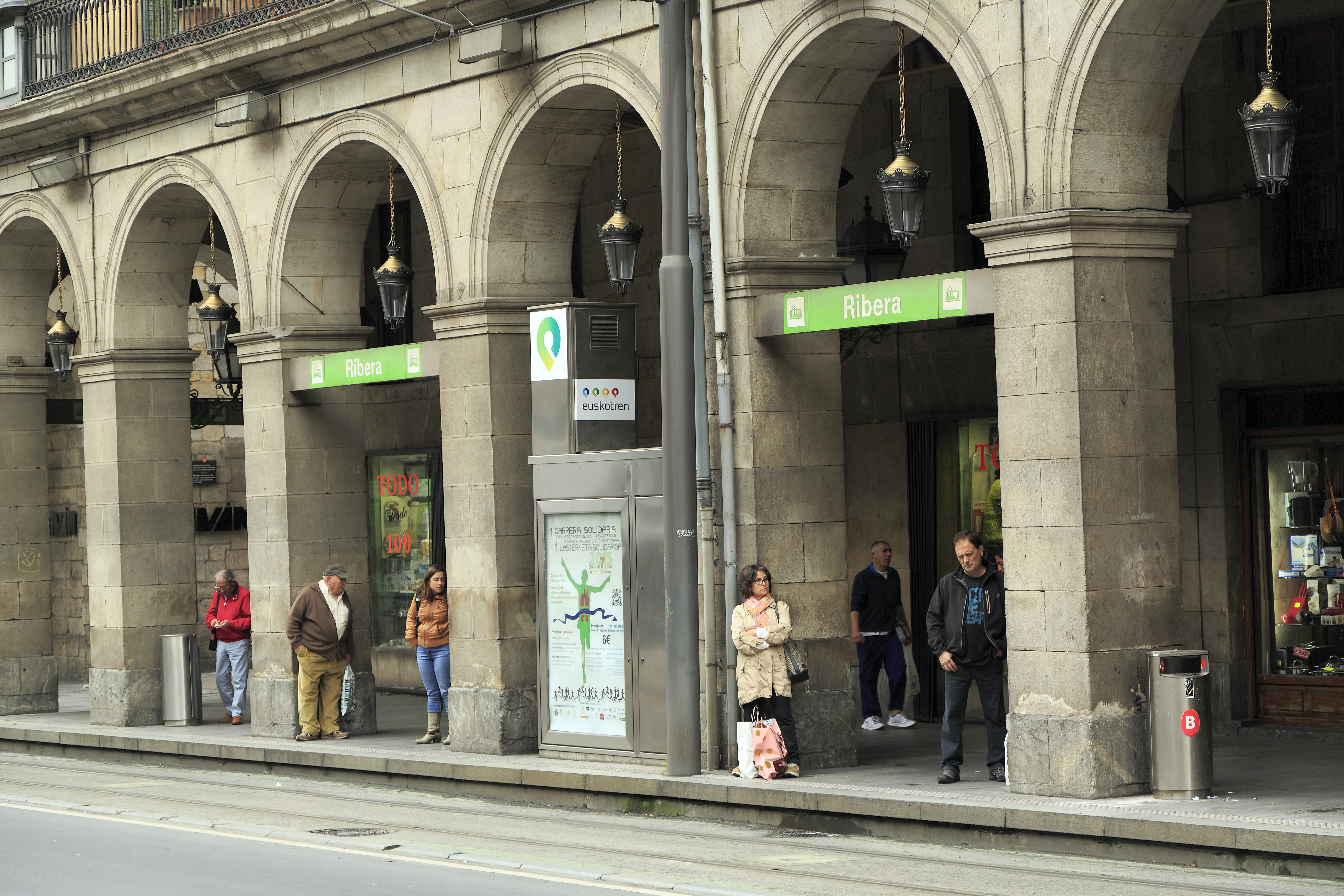 An der Straßenbahnstrecke La Casilla–Atxuri in Bilbao. Durch die Arkaden fiel eine Bahnsteigüberdachung hier ohne weiteren Aufwand mit ab. Die leicht erhöhte Bordkante reicht für einen stufenlosen Einstieg.